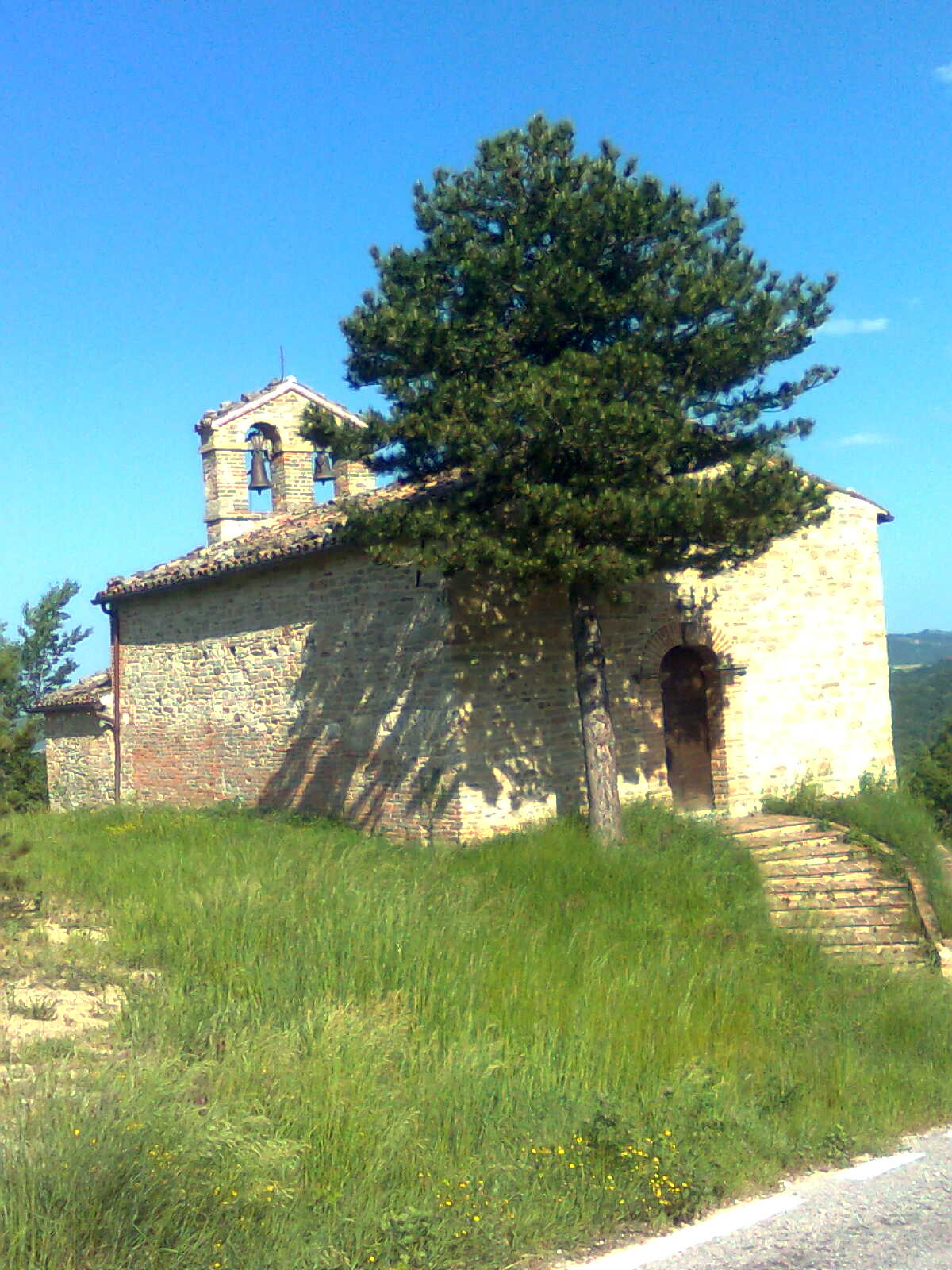 Chiesa San Pietro Rovitolo (Colmartese - Montefortino)